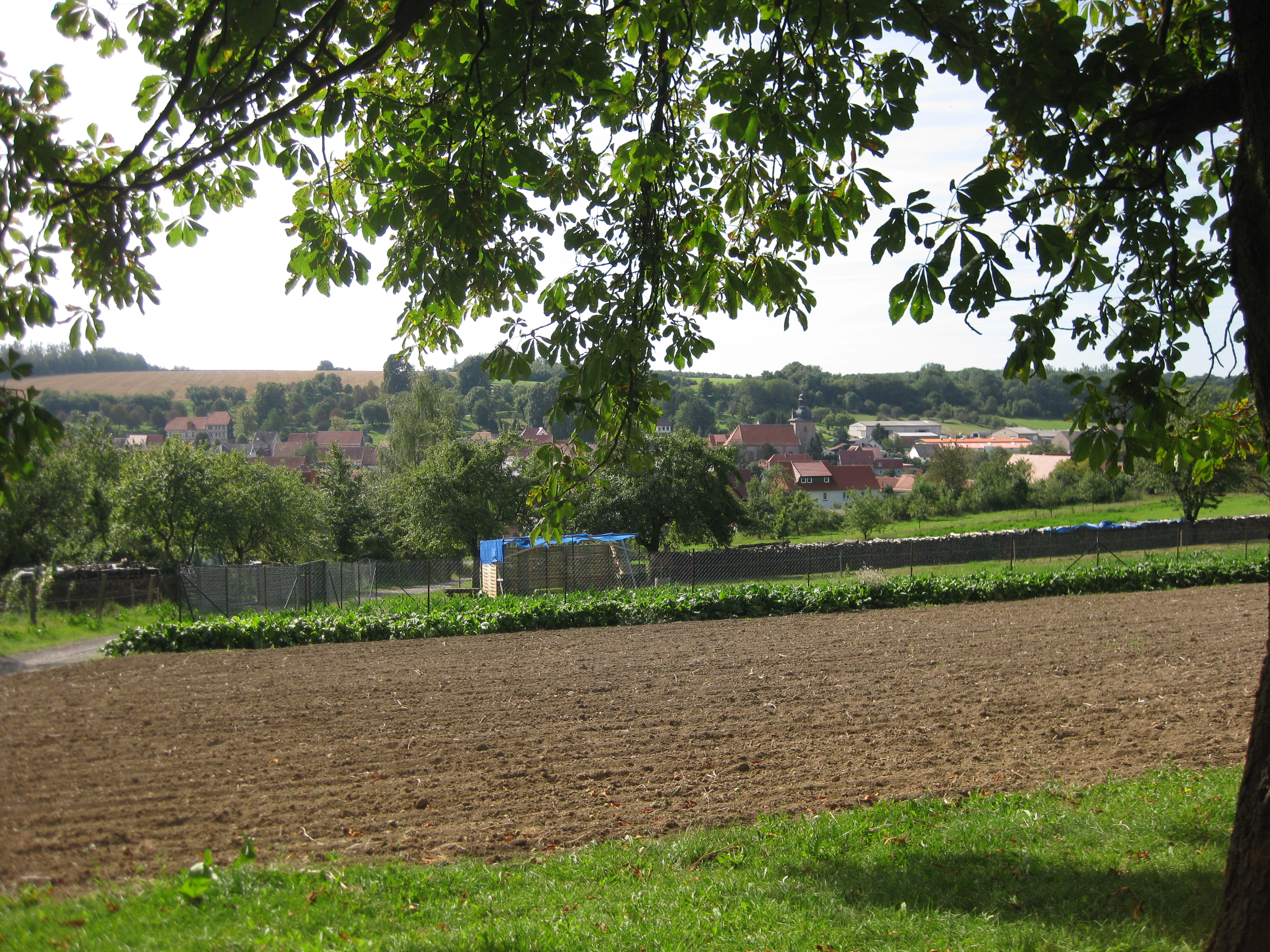 Ansicht über Kreuzebra von Norden (im Hintergrund links der Angerberg)